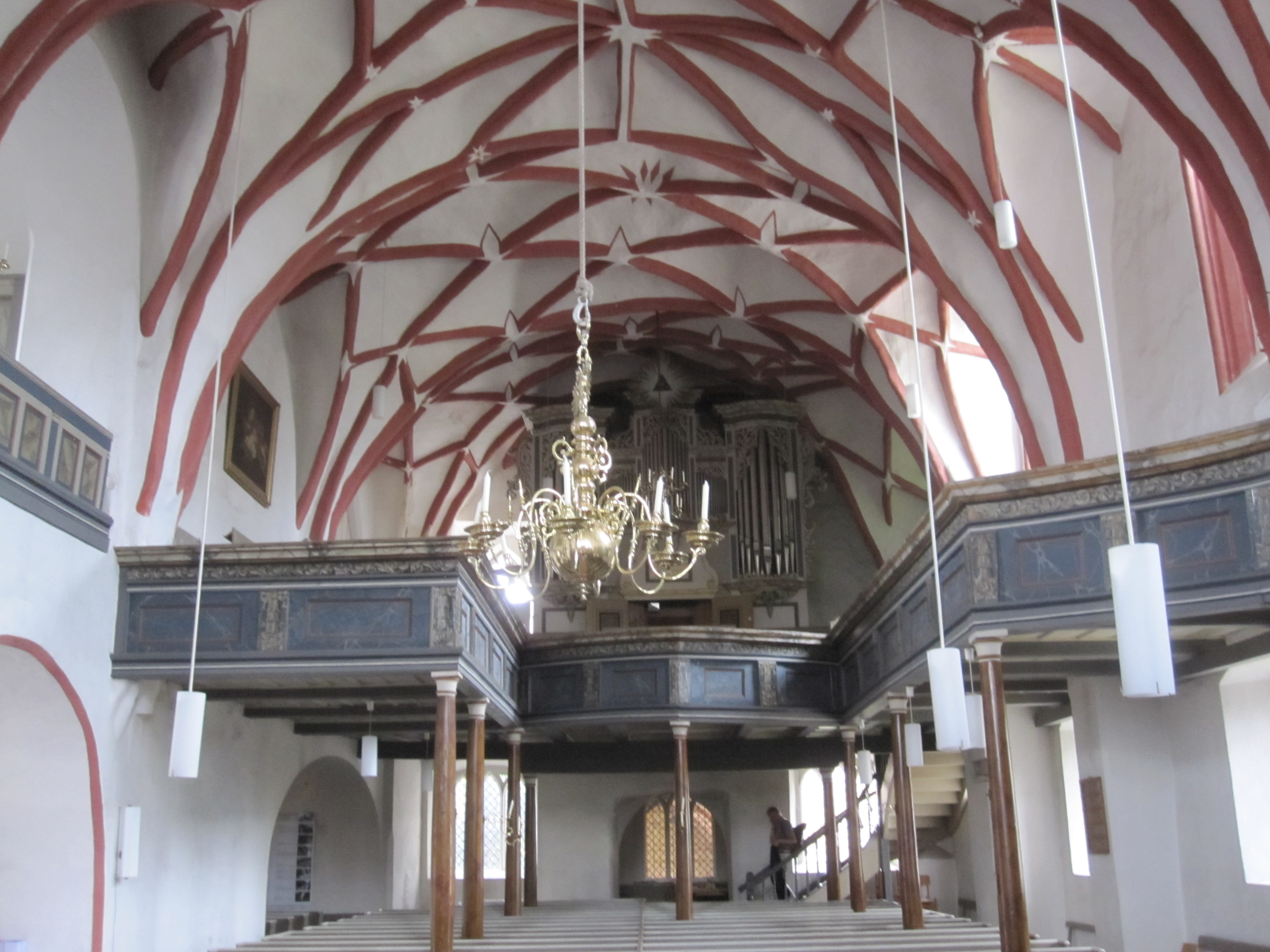 Blick nach Westen in das Kirchenschiff mit dem Gewölbe (erneuert 1653), der Empore aus dem 18. Jahrhundert und der Orgel, hinter deren Gehäuse von 1728 die nunmehr dritte Orgel erklingt von fünf Orgeln insgesamt, die in die Kirche eingebaut wurden: 1505, 1583 – Valentin Uckerow -, 1728 - Joachim Wagner, 1899 Orgelbau Sauer und 1976 VEB Orgelbau Sauer.